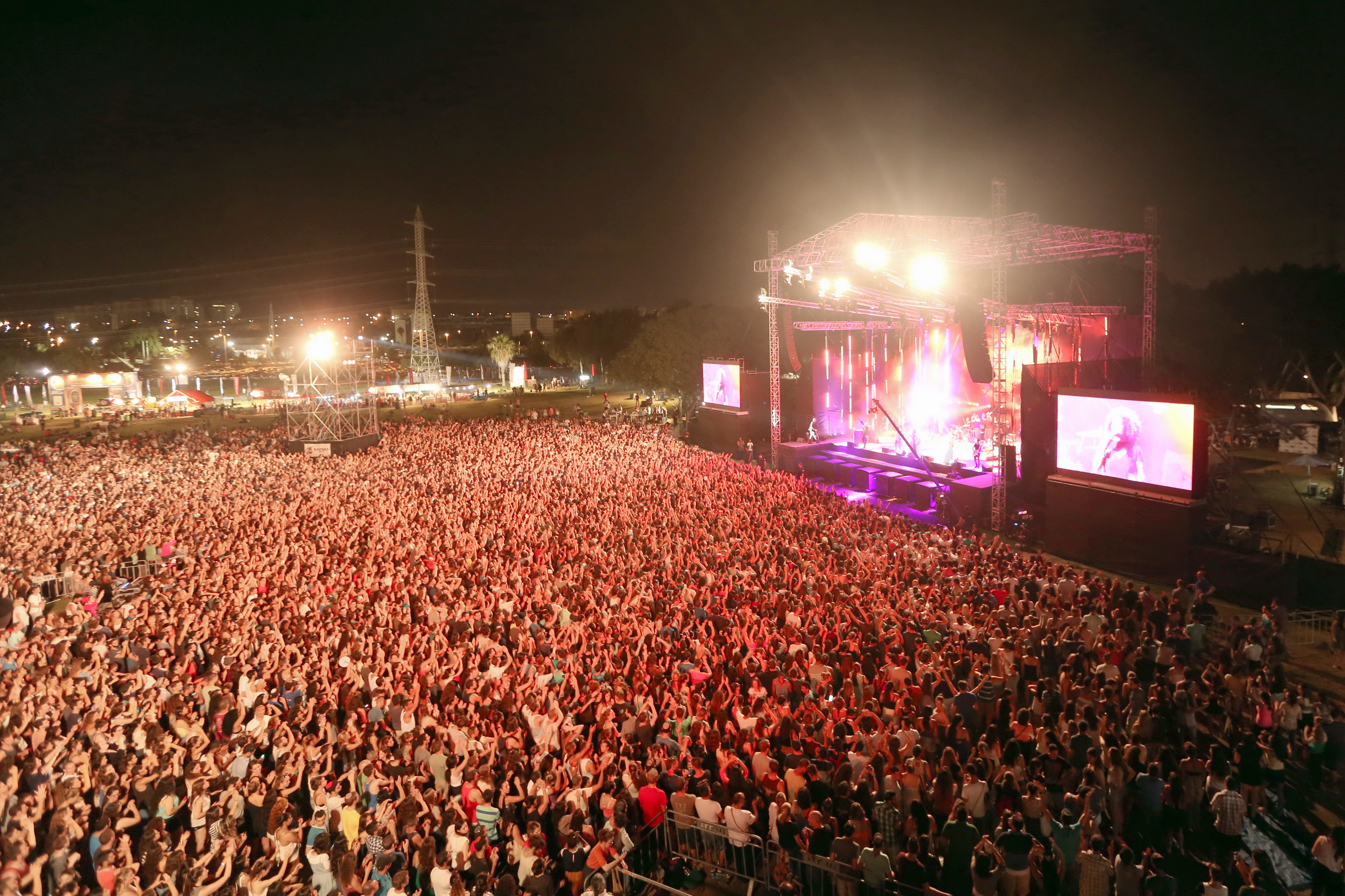 פסטיבל יותר